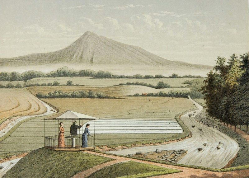 Litho. Litho naar een oorspronkelijke aquarel van J.C. Rappard.. Uitzicht op de Pangerango vanuit de plantentuin in Buitenzorg